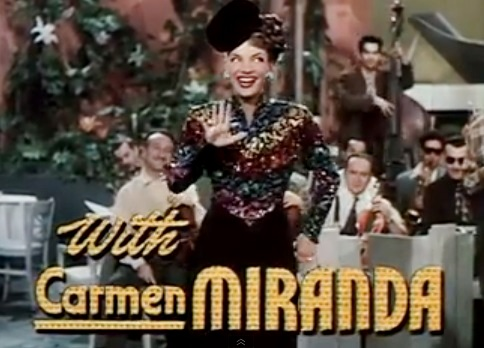 Imagem do trailer do filme "A Date with Judy". Os trailers dos filmes publicados antes de 1964 nos Estados Unidos são de domínio público.